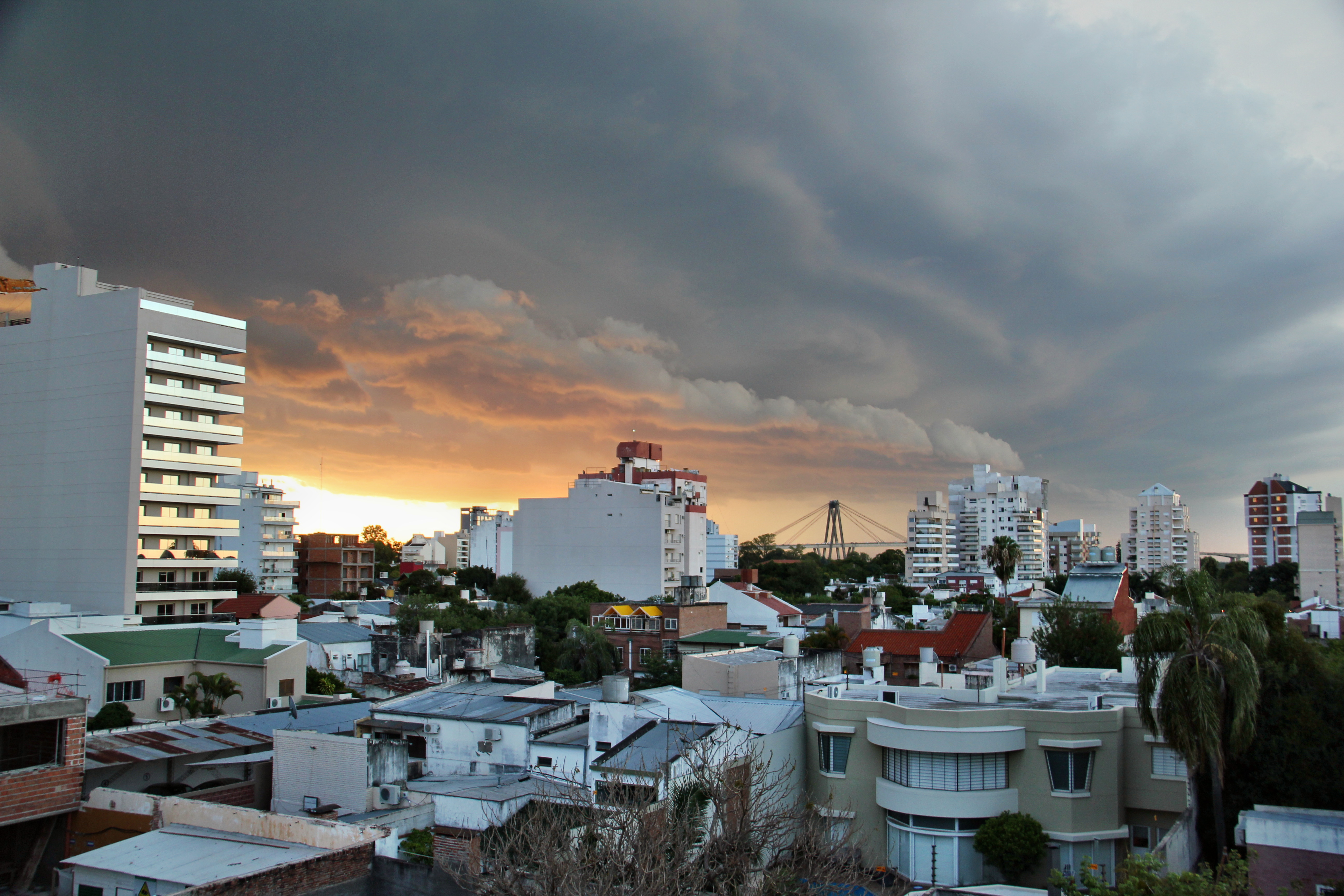 Tormenta sobre la ciudad de Corrientes, Capital